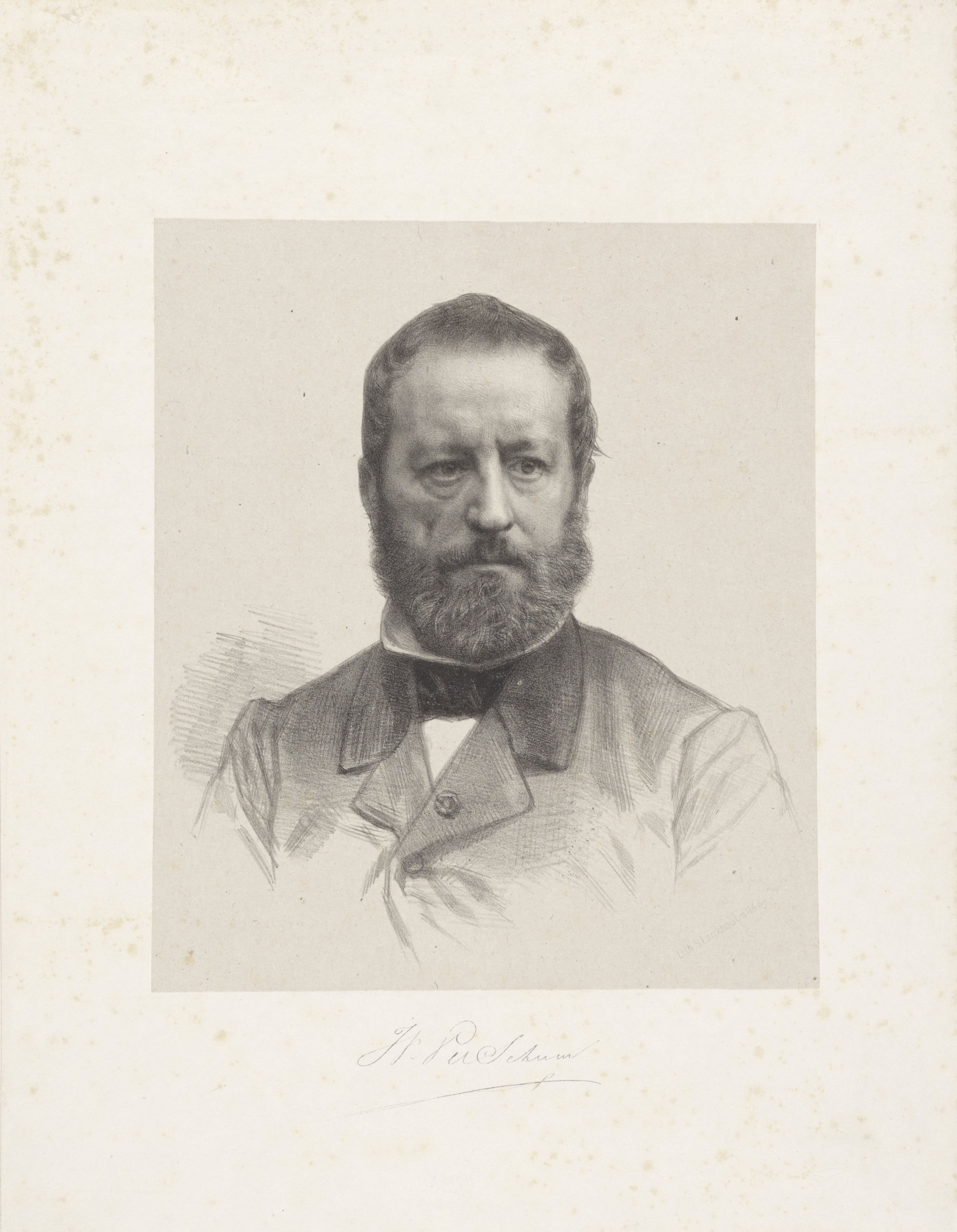 IdentificatieTitel(s): Portret van kunstenaar Wouter VerschuurObjecttype: prent Objectnummer: RP-P-1994-228Catalogusreferentie: Stuers 34Opschriften / Merken: opschrift, verso, handgeschreven: ‘Geboren te Amst 11 Juni 1812 + 1874’ verzamelaarsmerk, verso, gestempeld: Lugt 2228Omschrijving: Onder het portret signatuur van de geportretteerde.VervaardigingVervaardiger: prentmaker: August Allebé - drukker: Samuel Lankhout (vermeld op object) uitgever: Samuel Lankhout (vermeld op object)Plaats vervaardiging: prentmaker: Amsterdam - drukker: Den Haag - uitgever: Den HaagDatering: 1874 - 1875Fysieke kenmerken: lithografie op chine colléMateriaal: papier chine collé Techniek: lithografie (techniek)Afmetingen: blad: h 345 mm × b 268 mmOnderwerpWat: portrait, self-portrait of painterWie: Wouter VerschuurVerwerving en rechtenCredit line: Schenking van de erven van de heer I.Q. van Regteren Altena, AmersfoortVerwerving: schenking 1994Copyright: Publiek domein